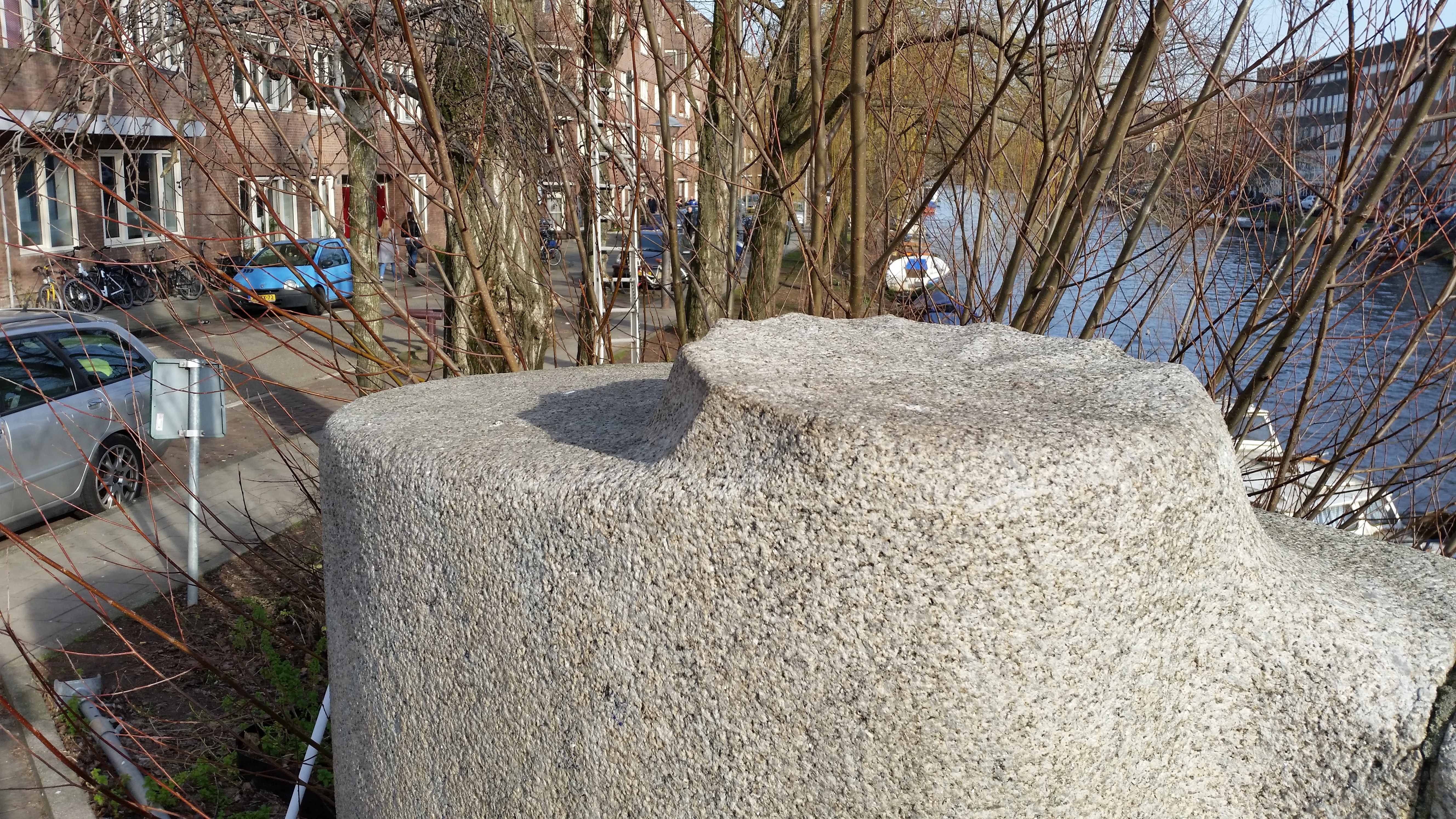 Bewerkt natuursteenelement aan de NO-kant van Brug 401, Ernst Cahn en Alfred Kohnbrug